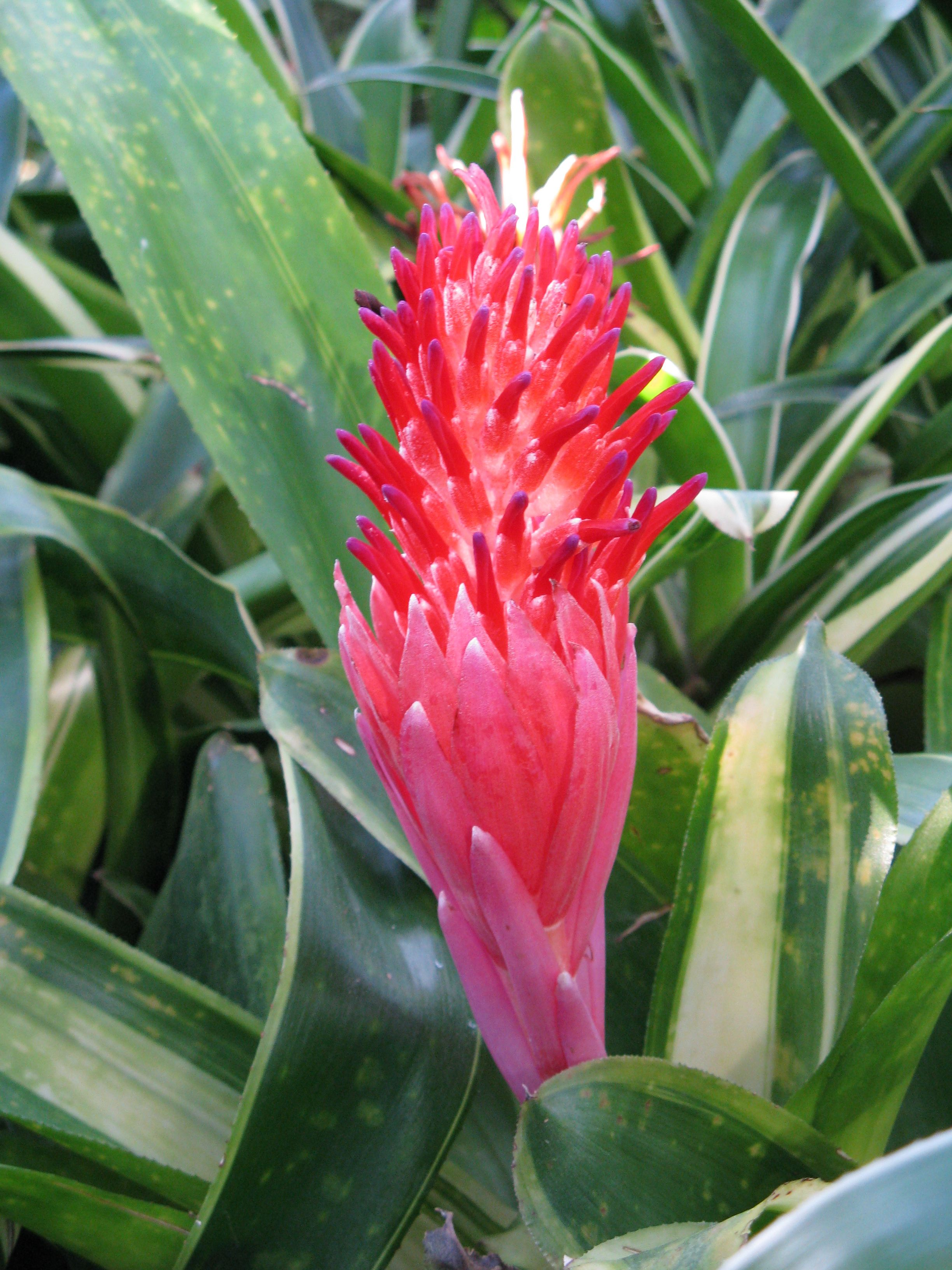 Billbergia pyramidalis 'Variegata'